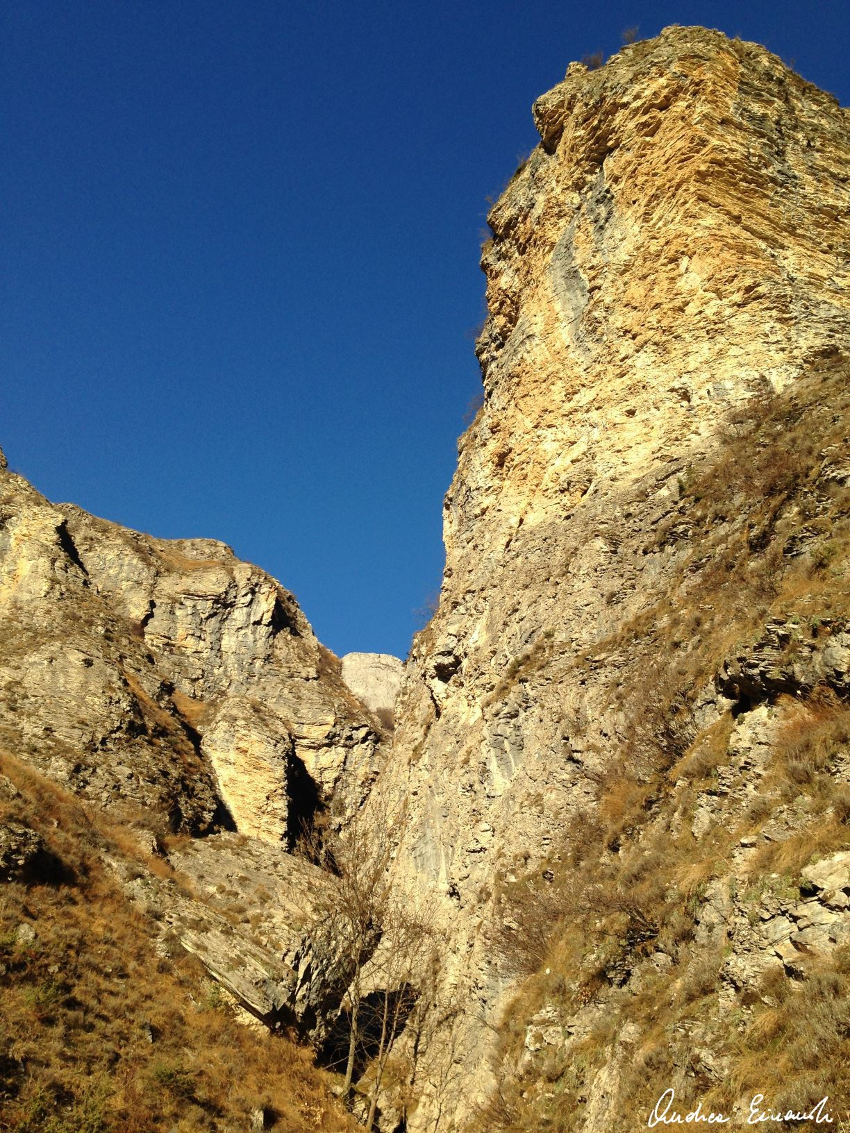 L'imbocco alle Gorge della Reina